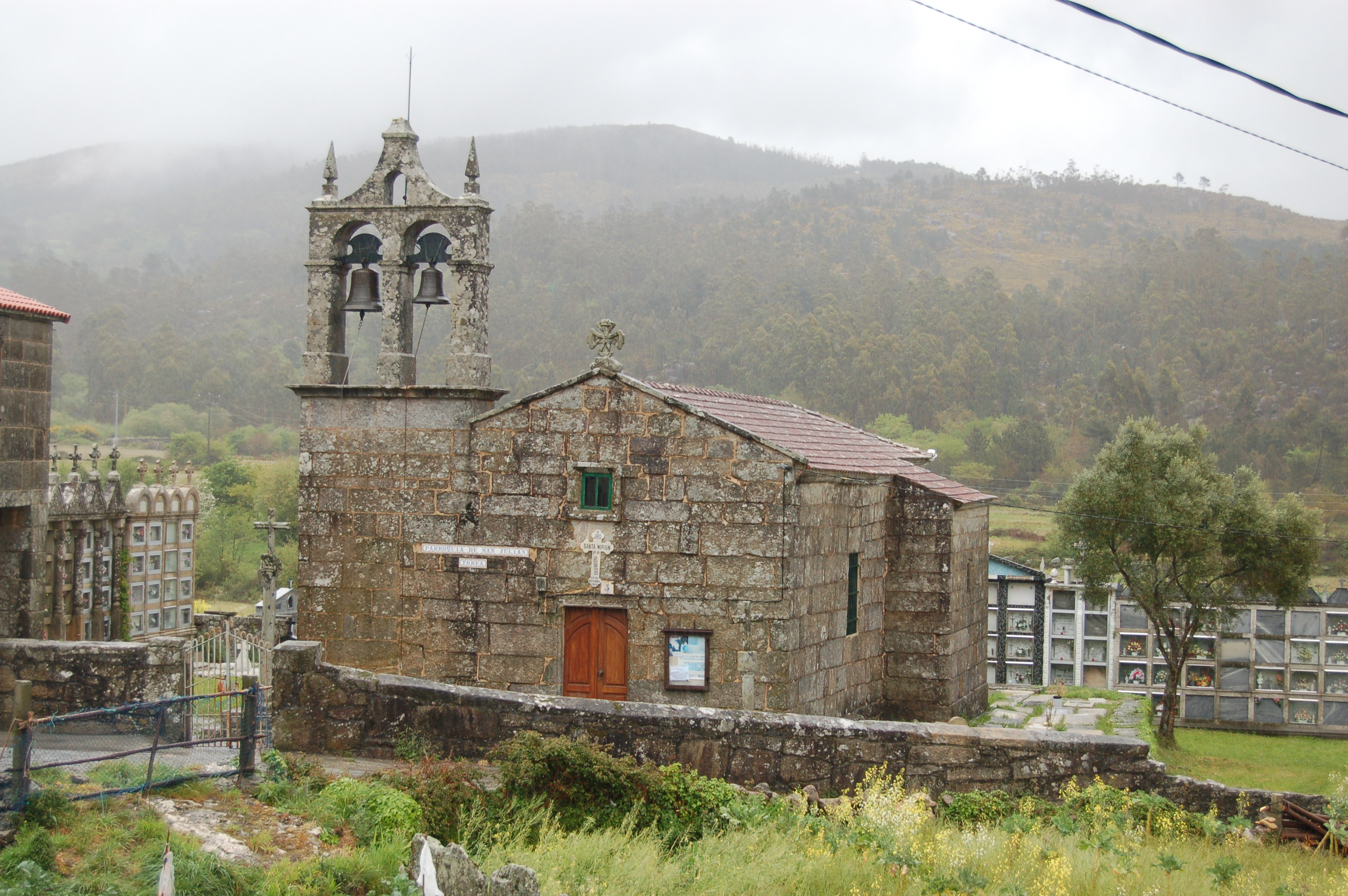 Igrexa parroquial de San Xián de Torea (Muros).